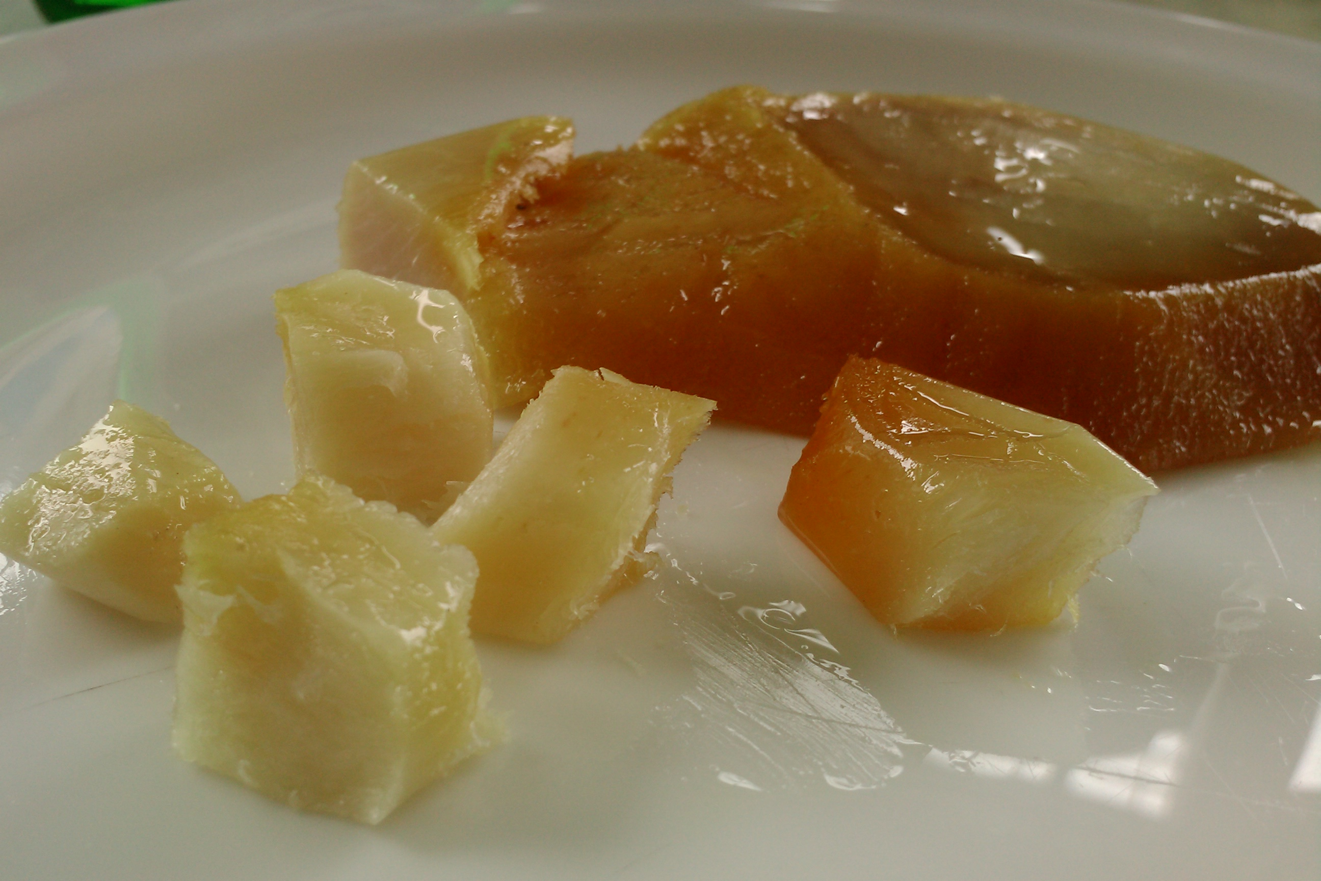 Hákarl à déguster